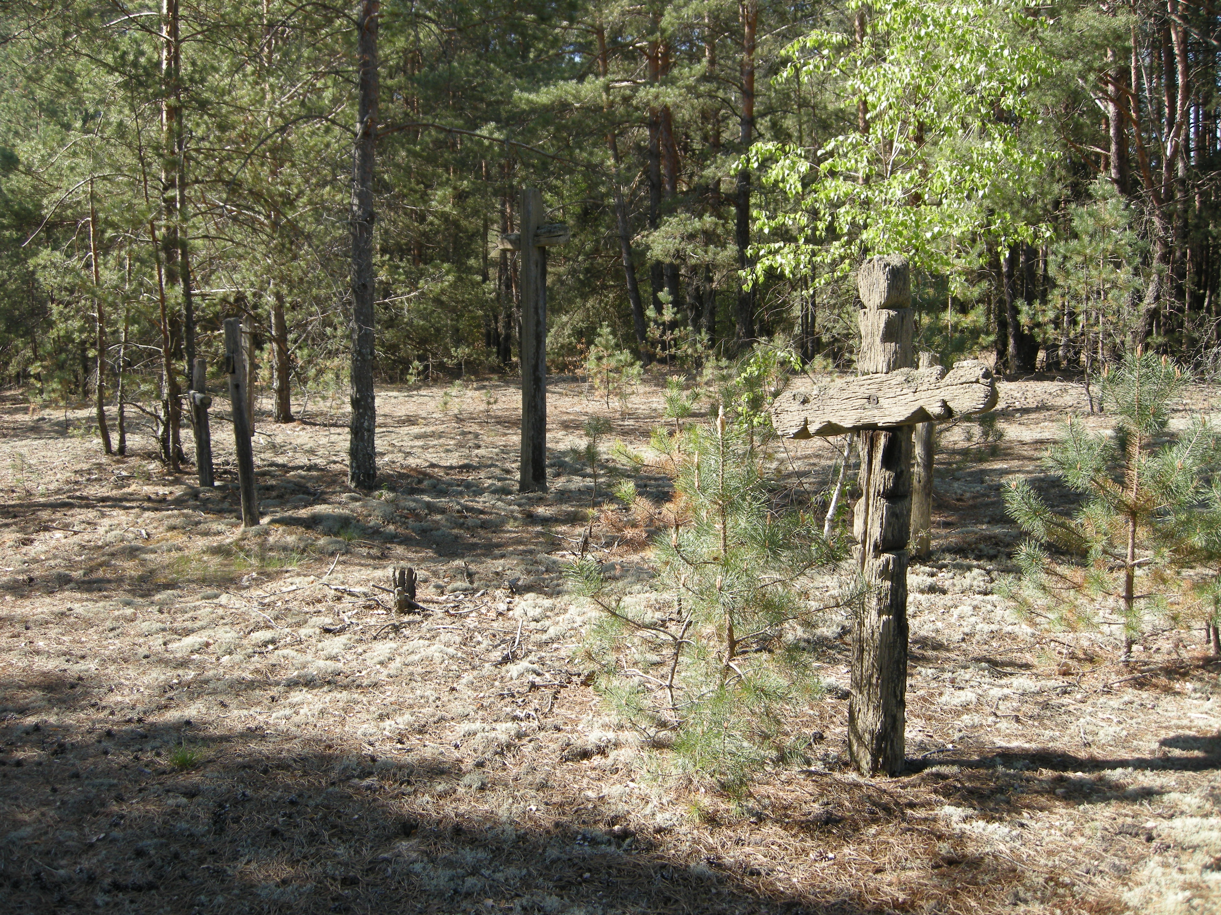 могили на місці хутора Каплиця